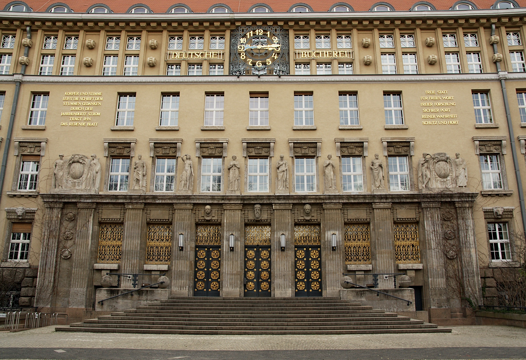 Eingang Deutsche Nationalbibliothek Leipzig